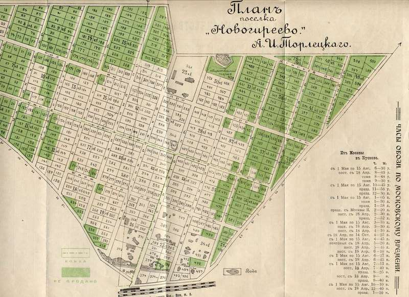 План посёлка Новогиреево А. И. Торлецкого